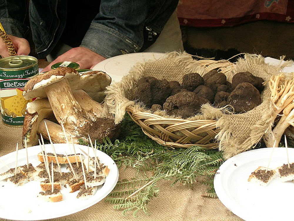 Truffes d'été à la Sagra del tartufo de Colliano